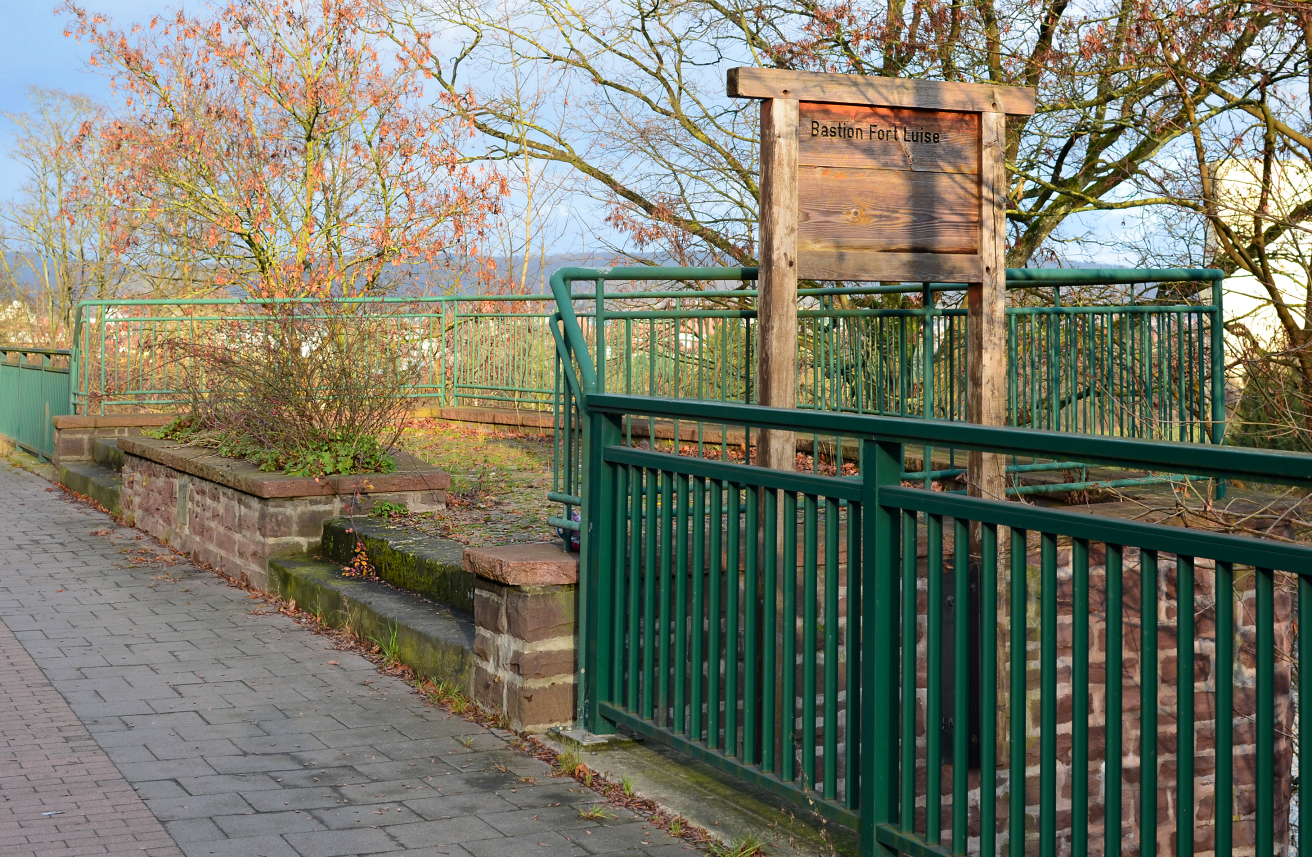 Befestigungsanlagen auf dem Klüt, Baurest von Fort Luise oberhalb der Weser an der B 1/B 83